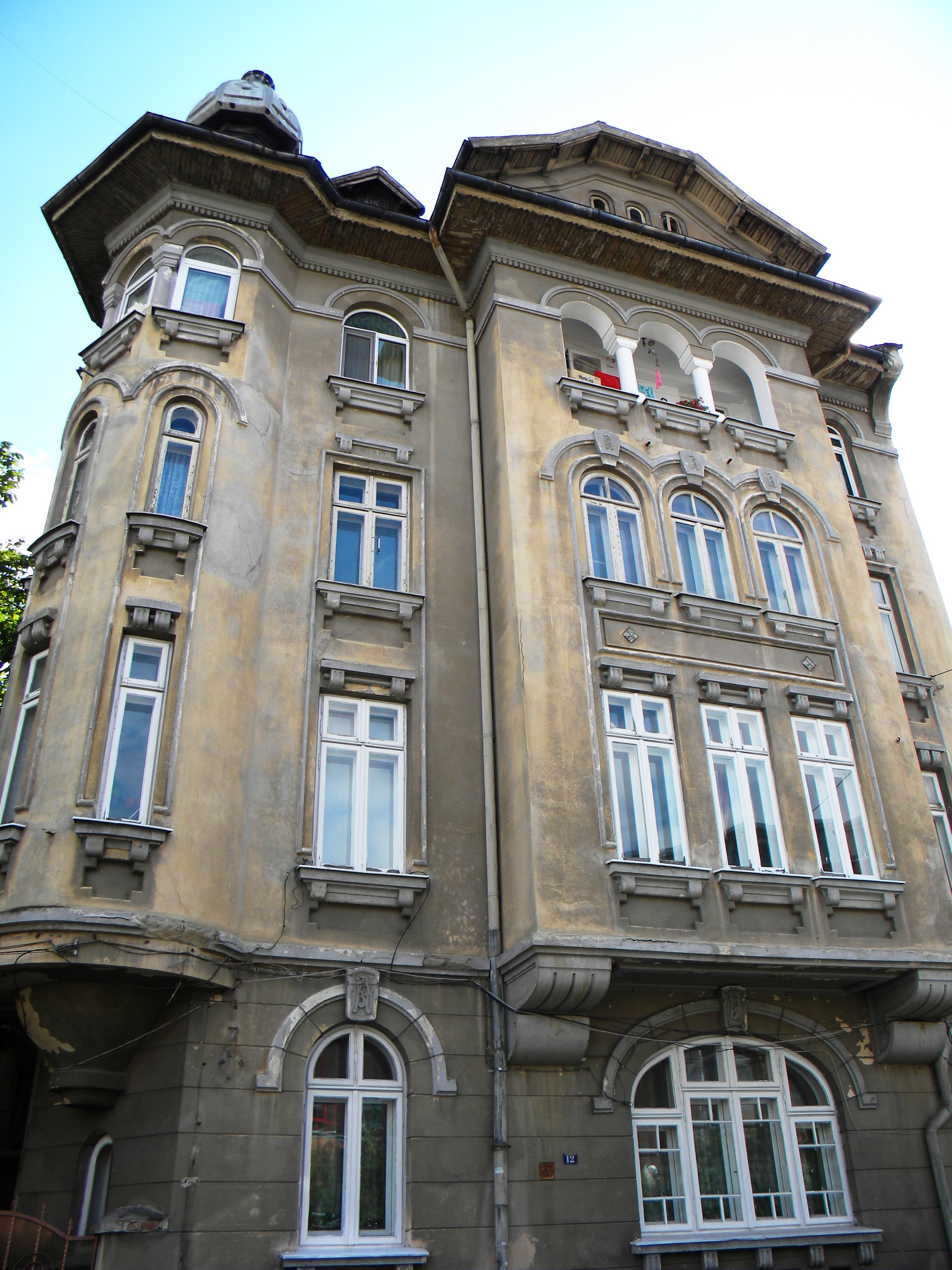 Bucuresti, Romania, Casa pe Str. Slanic nr. 12, sect. 3